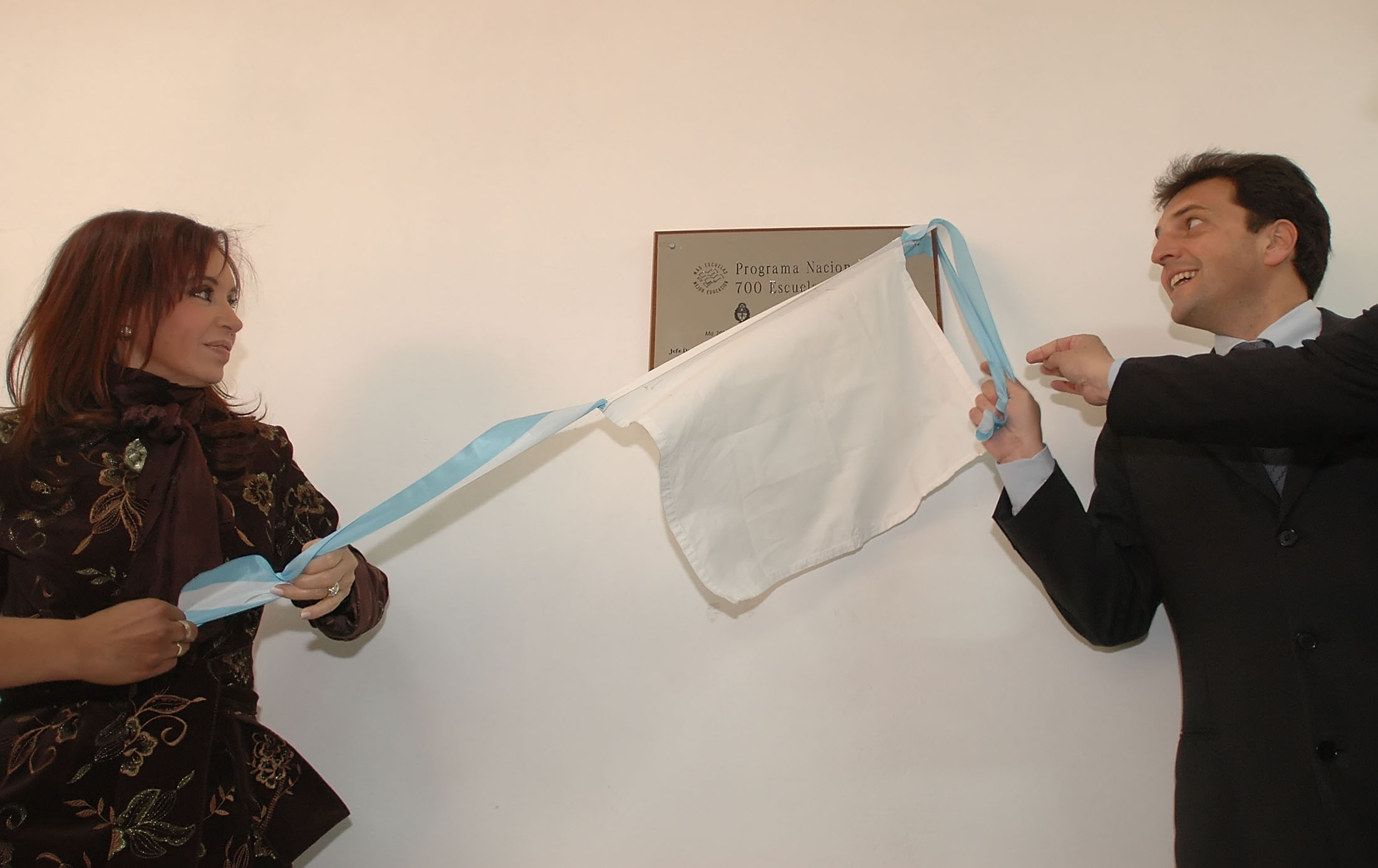 La Presidenta decubre una placa en el nuevo jardín, junto al jefe de Gabinete, Sergio Massa